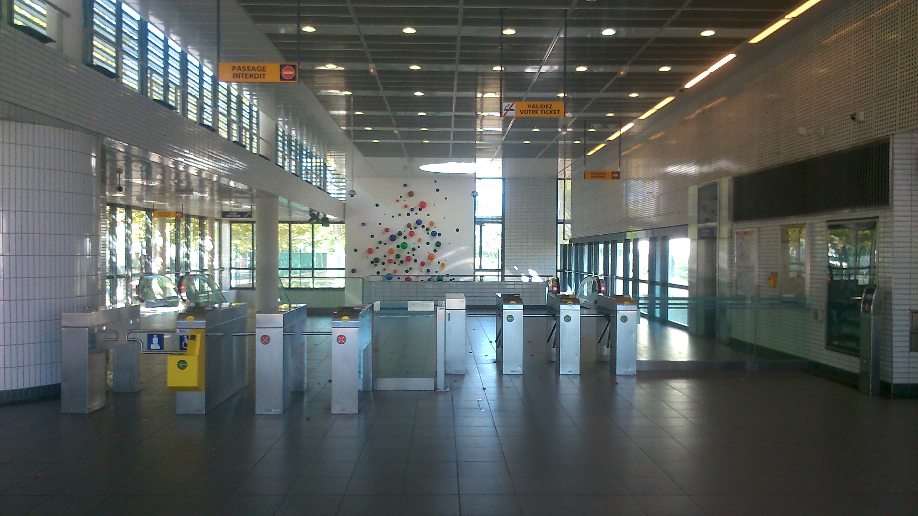 Intérieur de la station Faculté de Pharmacie du métro de Toulouse